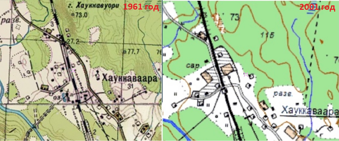 Хауккаваара, переезд на картах, 1961-2001